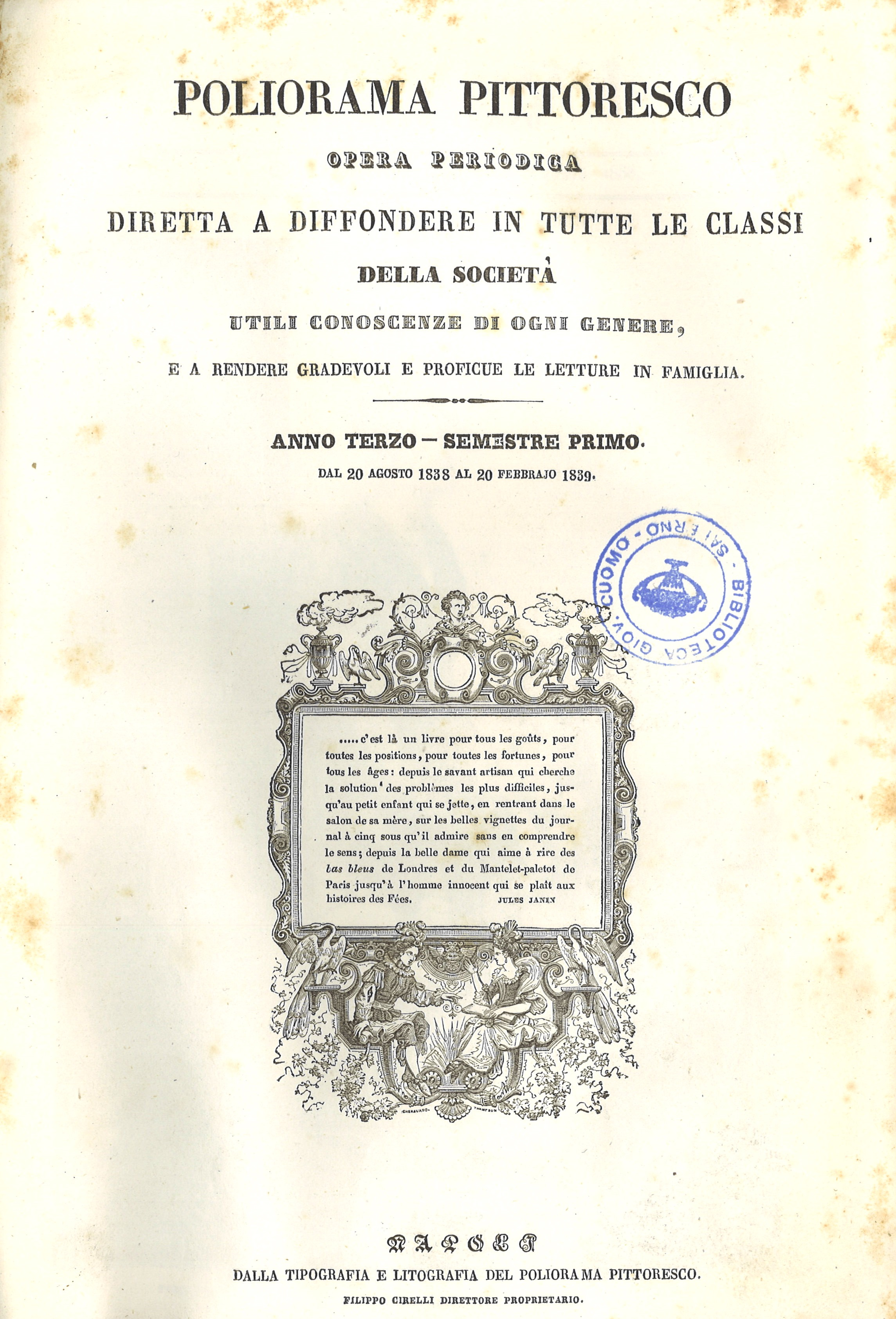 Frontespizio di Poliorama Pittoresco, Anno Terzo - Semestre Primo. Dal 20 agosto 1838 al 20 febbraio 1839 Sul frontespizio: Opera periodica diretta a diffondere in tutte le classi della società utili conoscenze di ogni genere, e a rendere gradevoli e proficue le letture in famiglia.